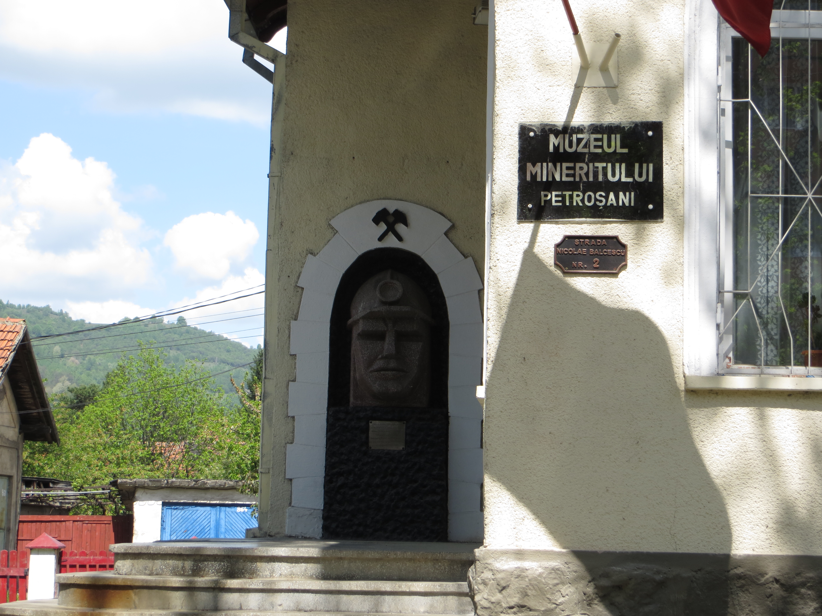 Primul sediu al S.A.R. Petroșani, azi Muzeul Mineritului